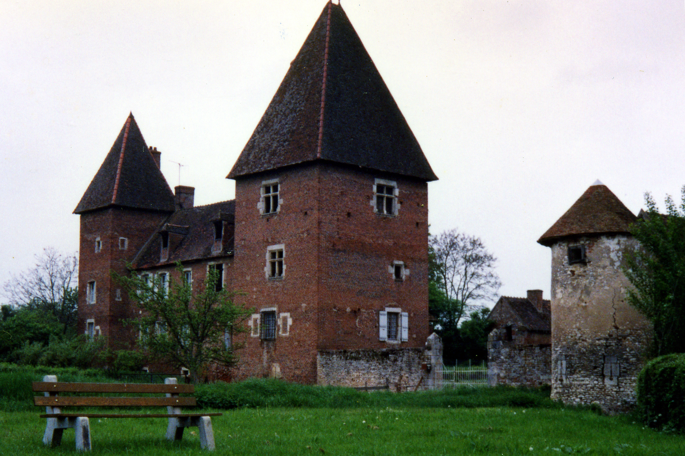 Château de Messey-sur-Grosne